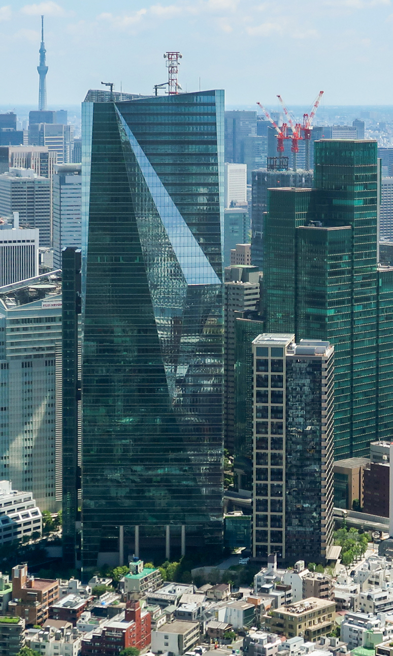 Sumitomo Fudosan Roppongi Grand Tower